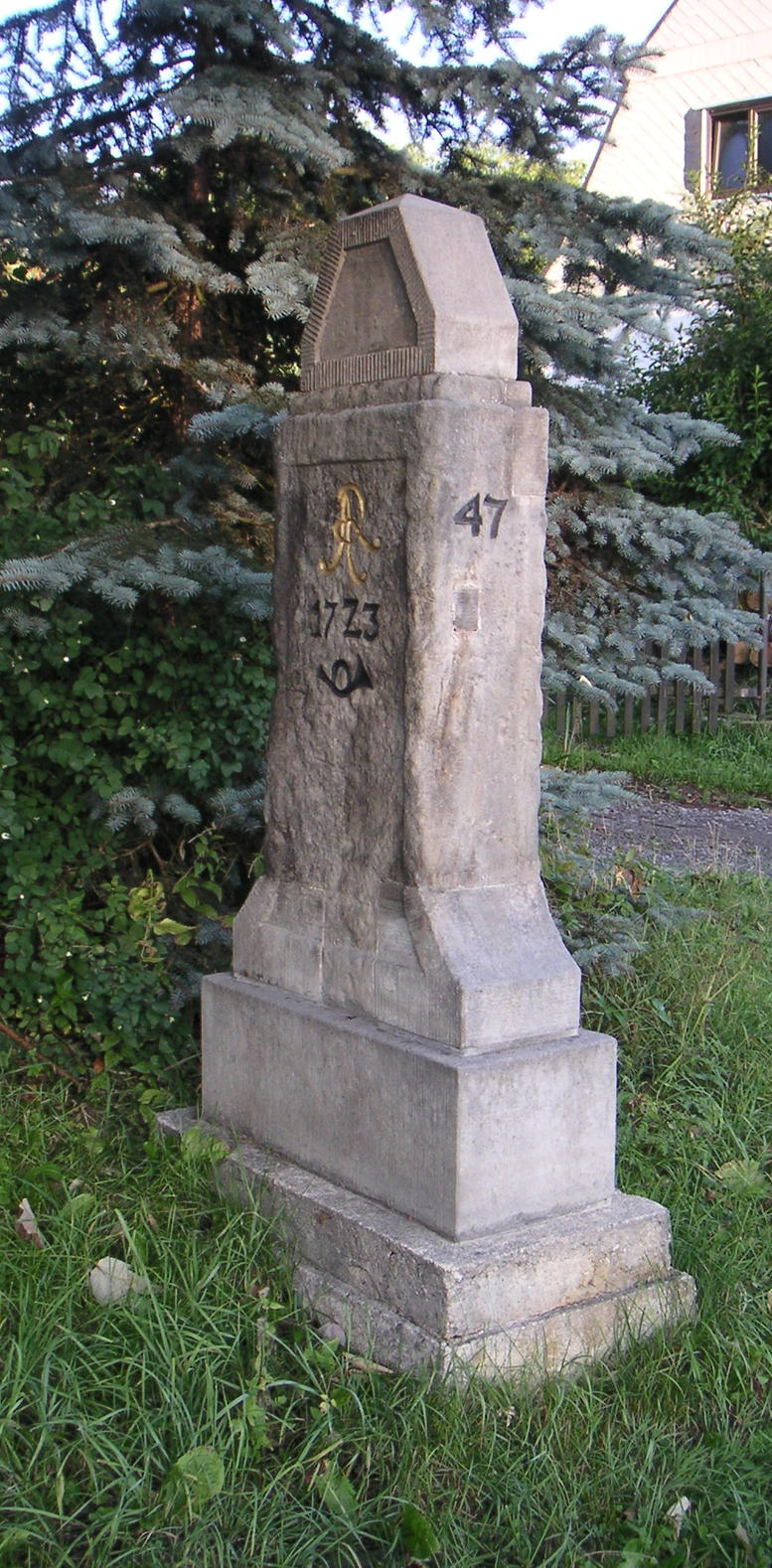 Kursächs. Viertelmeilenstein von 1723 mit der Reihennummer 47 an der B95 in Schönfeld